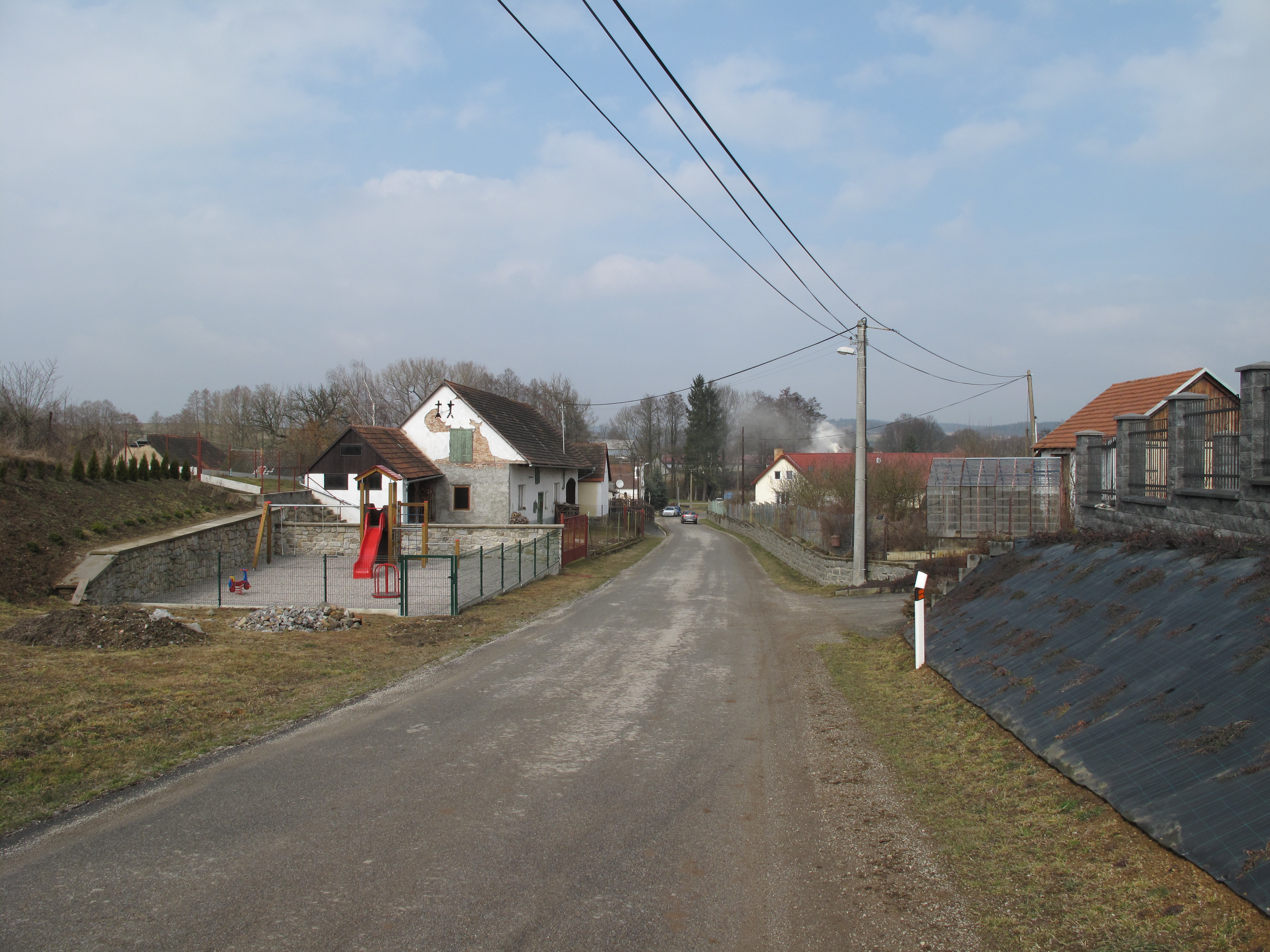 Silnice v Bohunicích. Okres Prachatice, Česká republika.